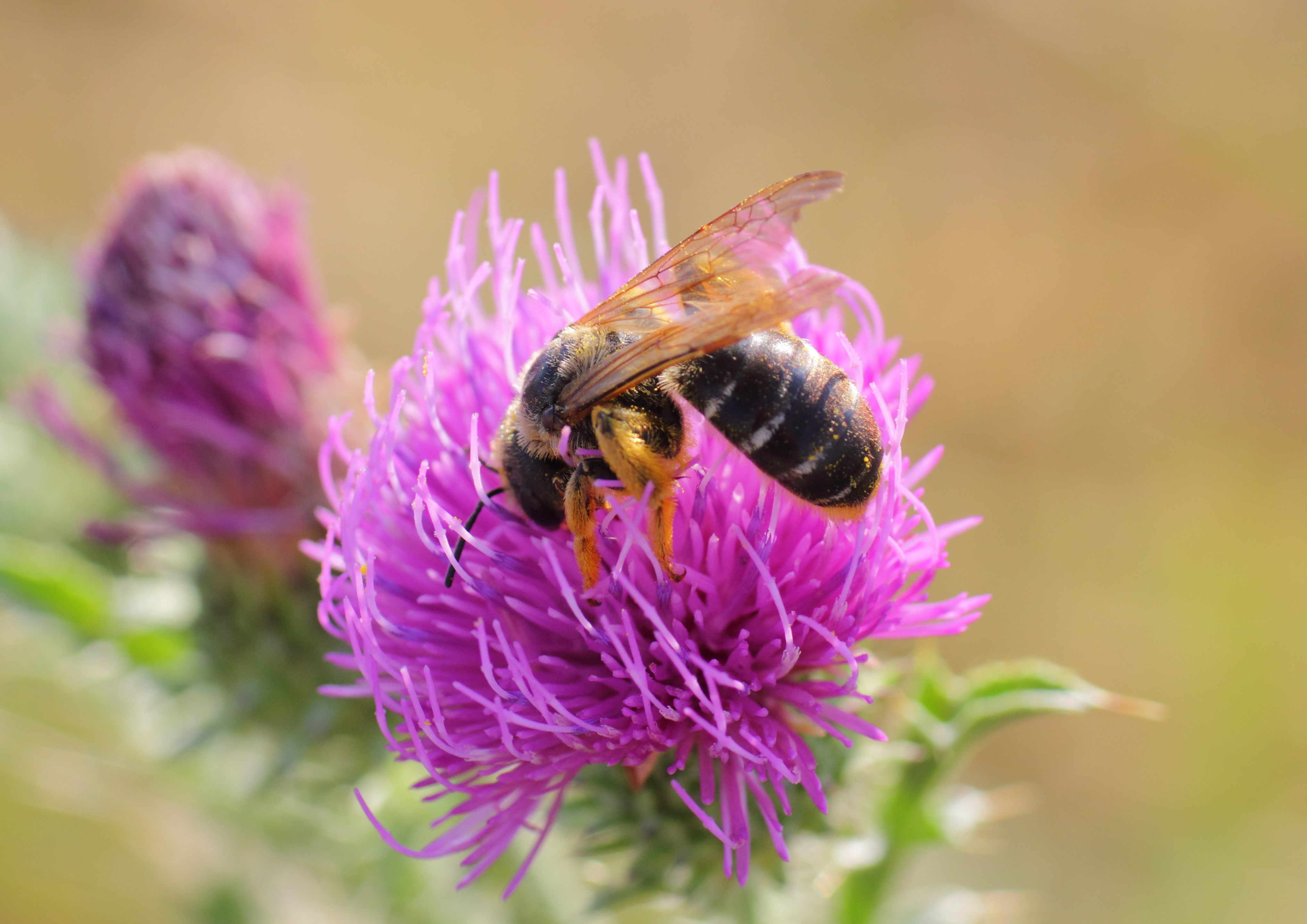 Eine weibliche Biene (Halictus quadricinctus) im Burgenland.